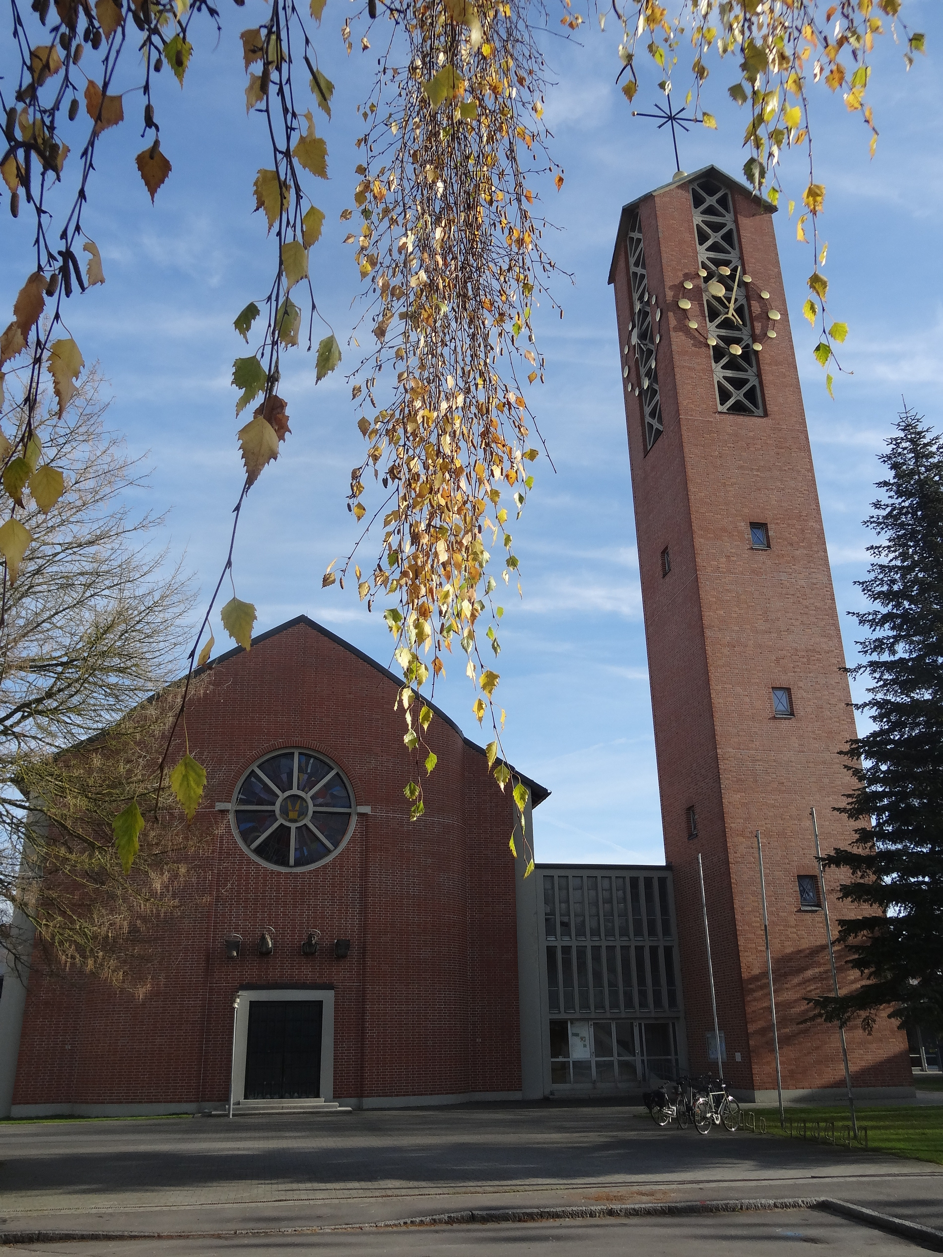 Katholische Pfarrkirche St. Wolfgang in Landshut